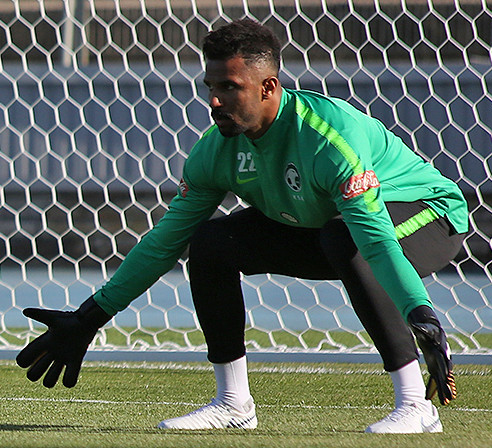 Сборная Саудовской Аравии потренировалась в Петербурге